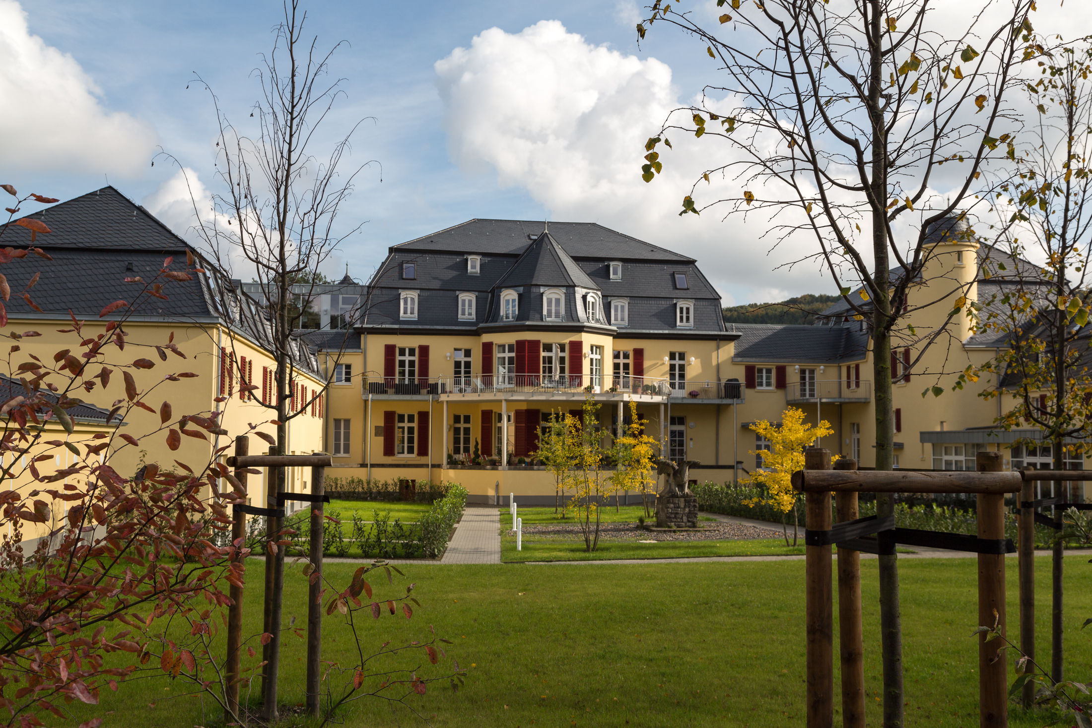 Rösrath, Denkmalnummer 23, Venauen (Haus Venauen) nach der Renovierung